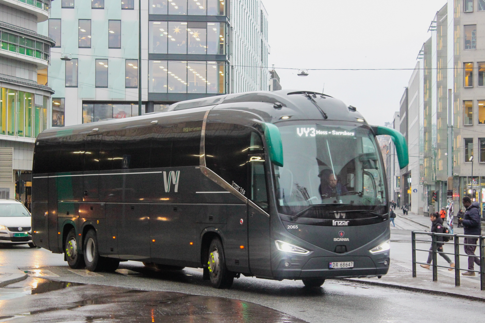 Vy Buss